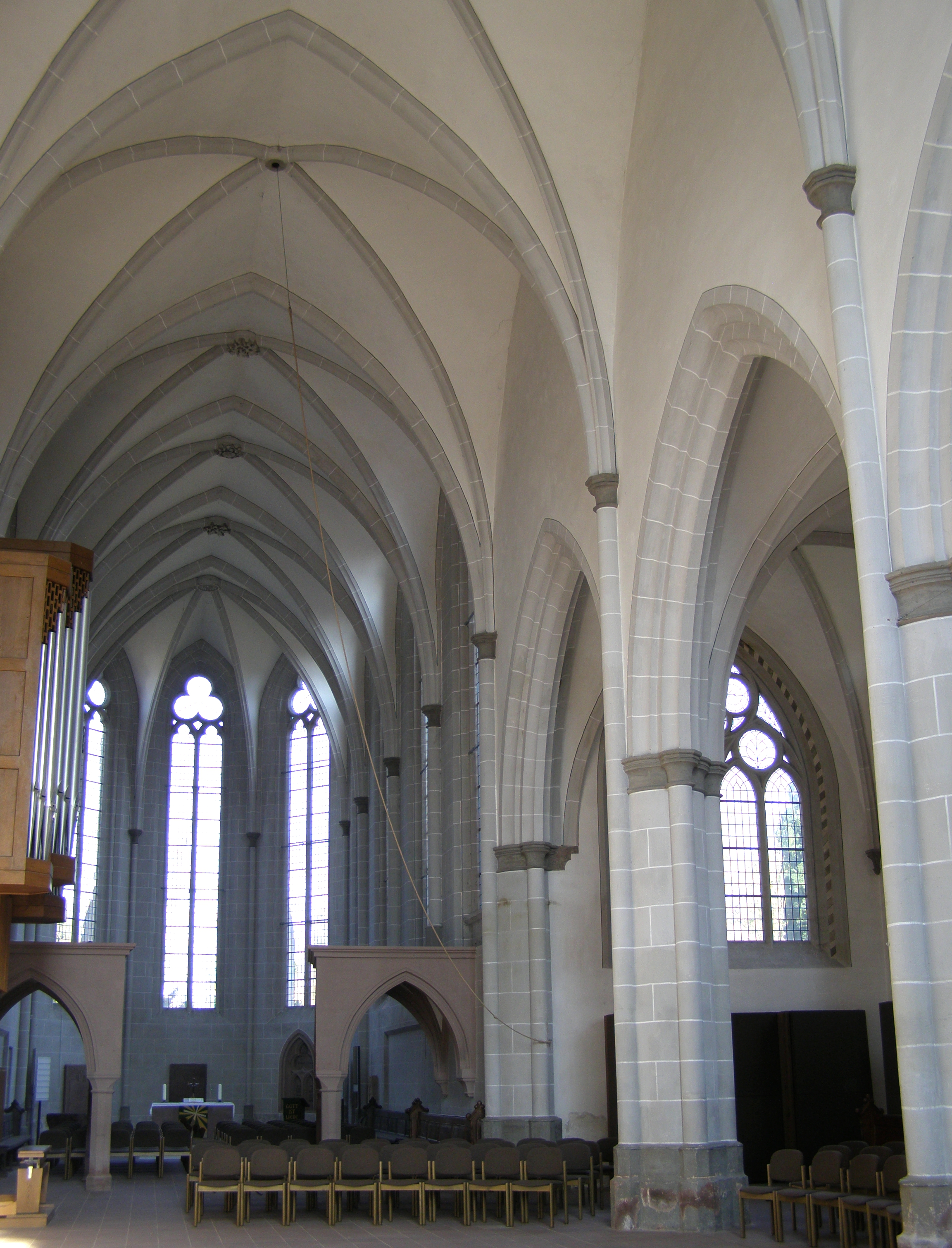 Innenraum der Marienkirche Höxter